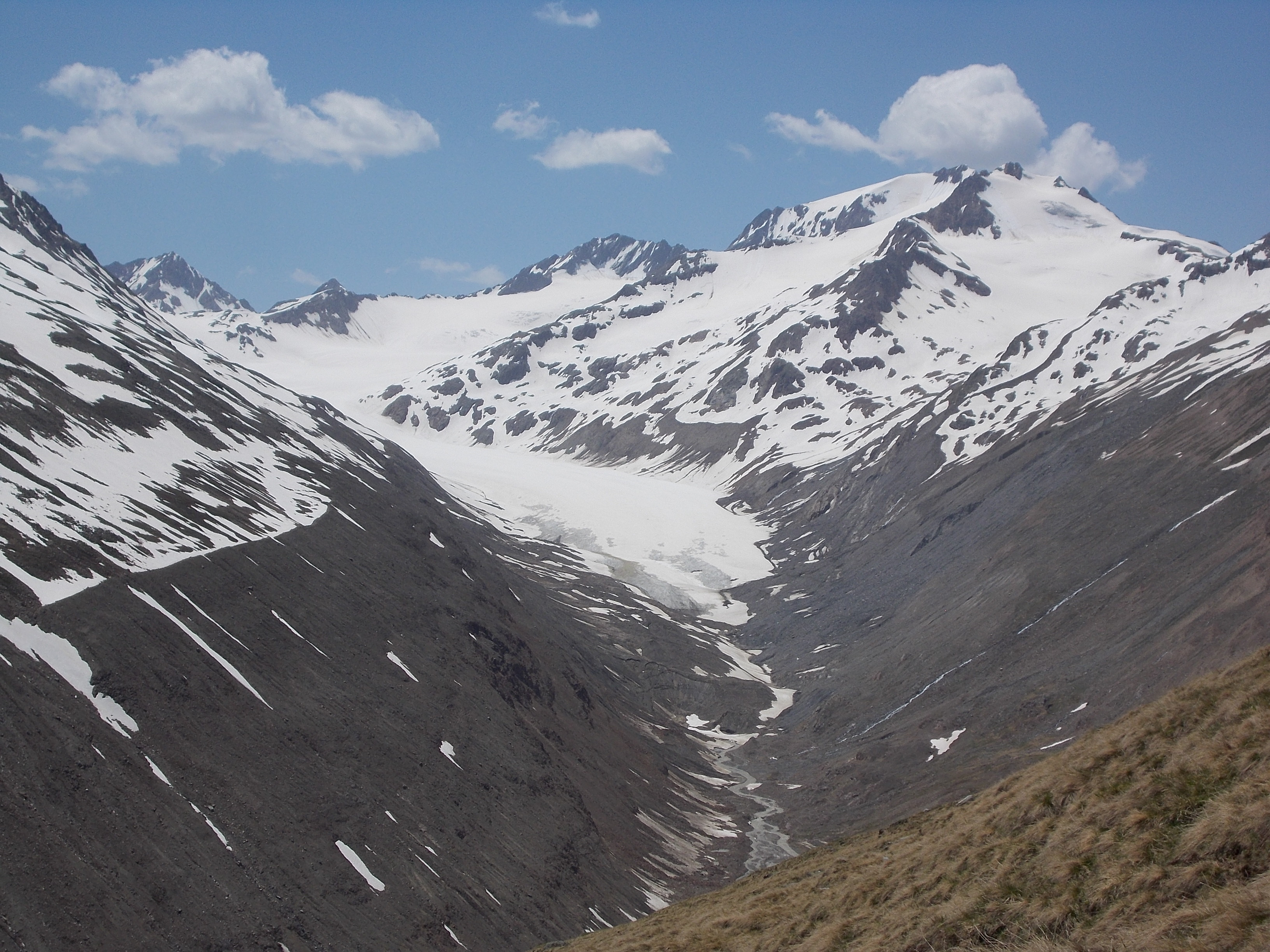 Die Moräne am linkem Bildrand zeigt, wie mächtig der Hintereisferner einmal war